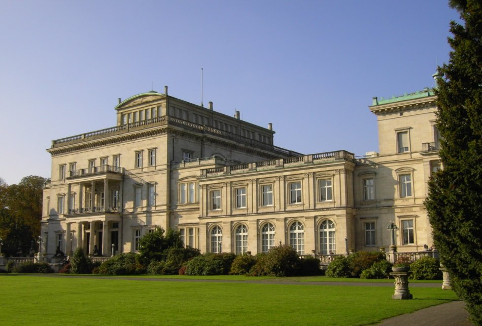 Gartenseite der Villa Hügel, das ehemalige Wohnhaus der Krupp-Familie in Essen